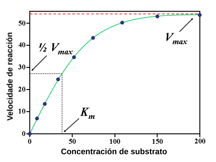 Gráfica da velocidade dunha reacción encimática de Michaelis-Menten